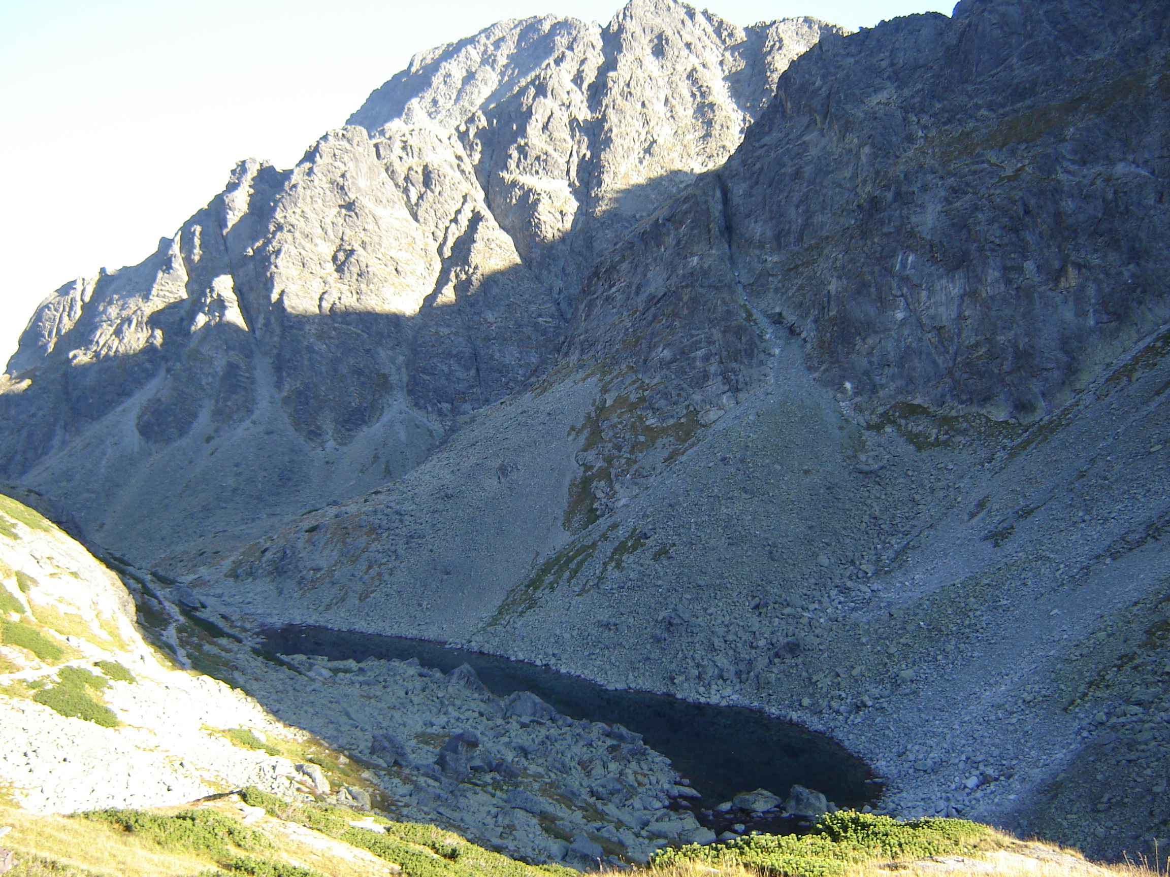 Dlhé pleso zo Zbojníckej chaty